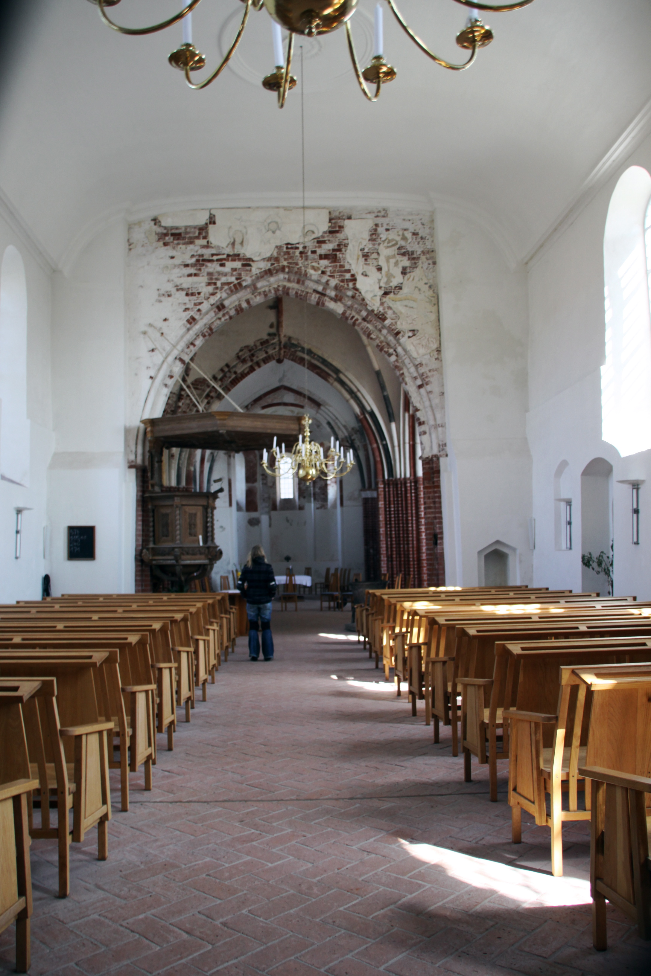 Kreuzkirche Pilsum